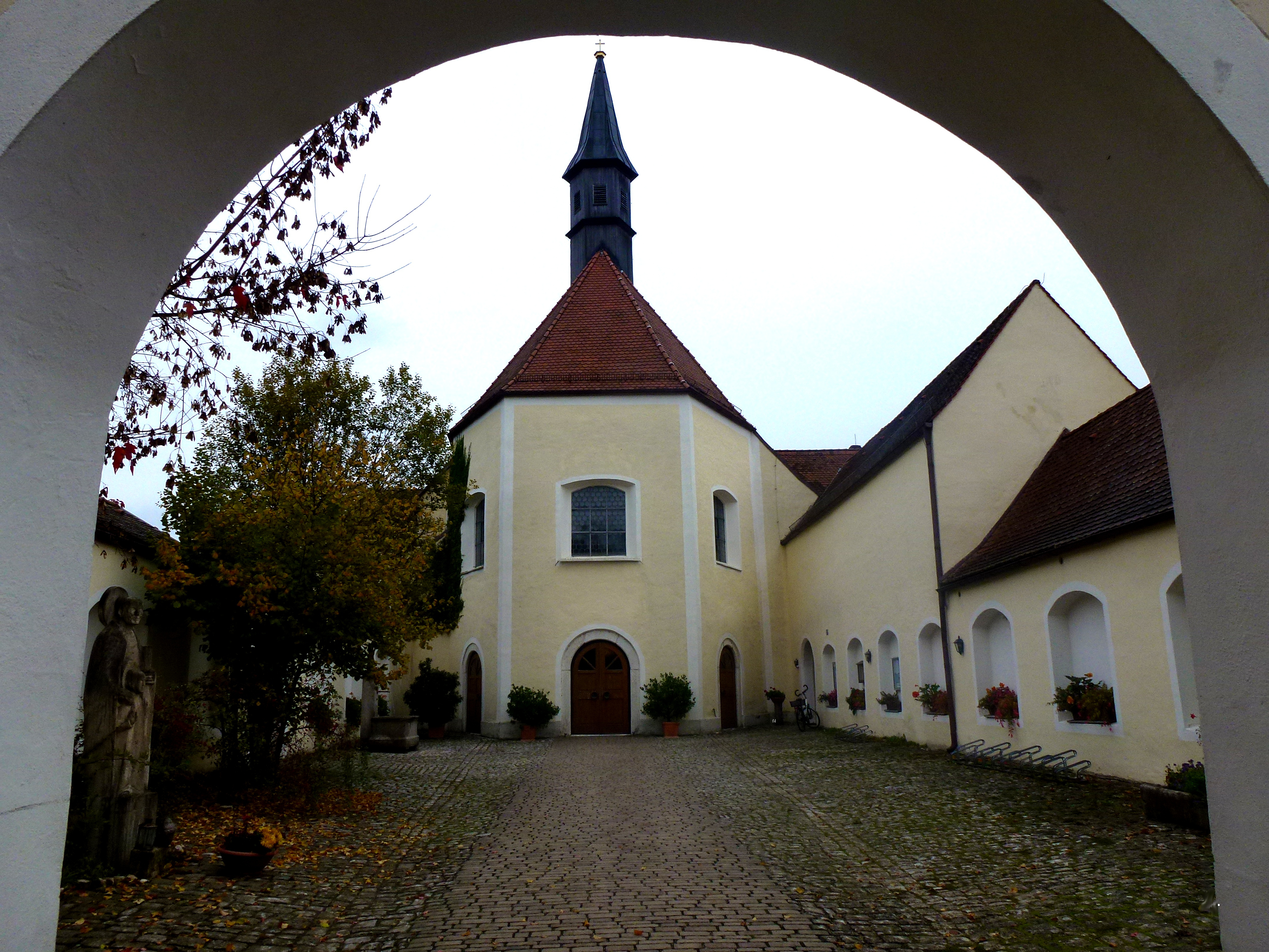 Franziskanerklosterkirche St.Johannes-EvangelistThis is a photograph of an architectural monument.